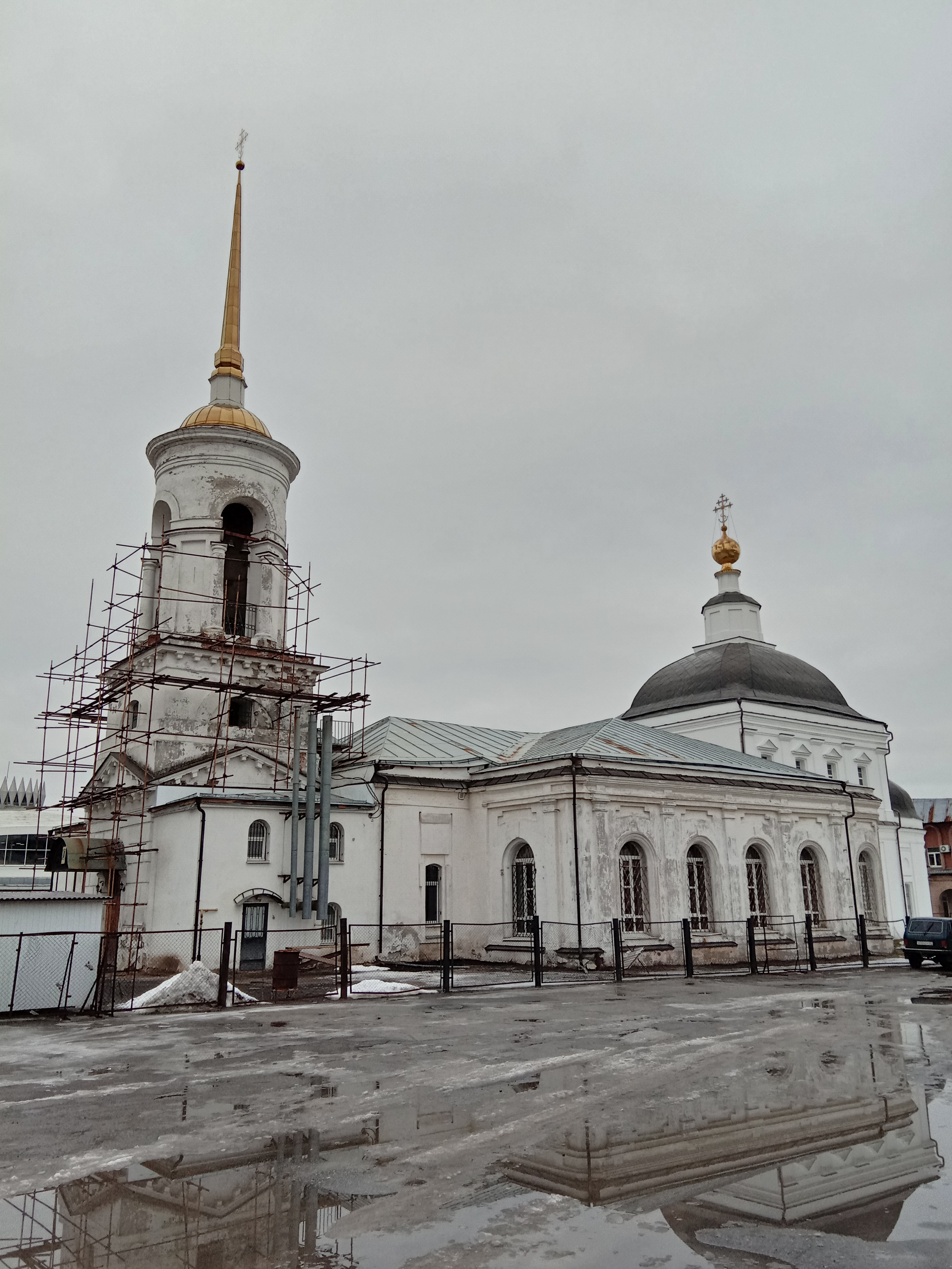 Екатерининский храм